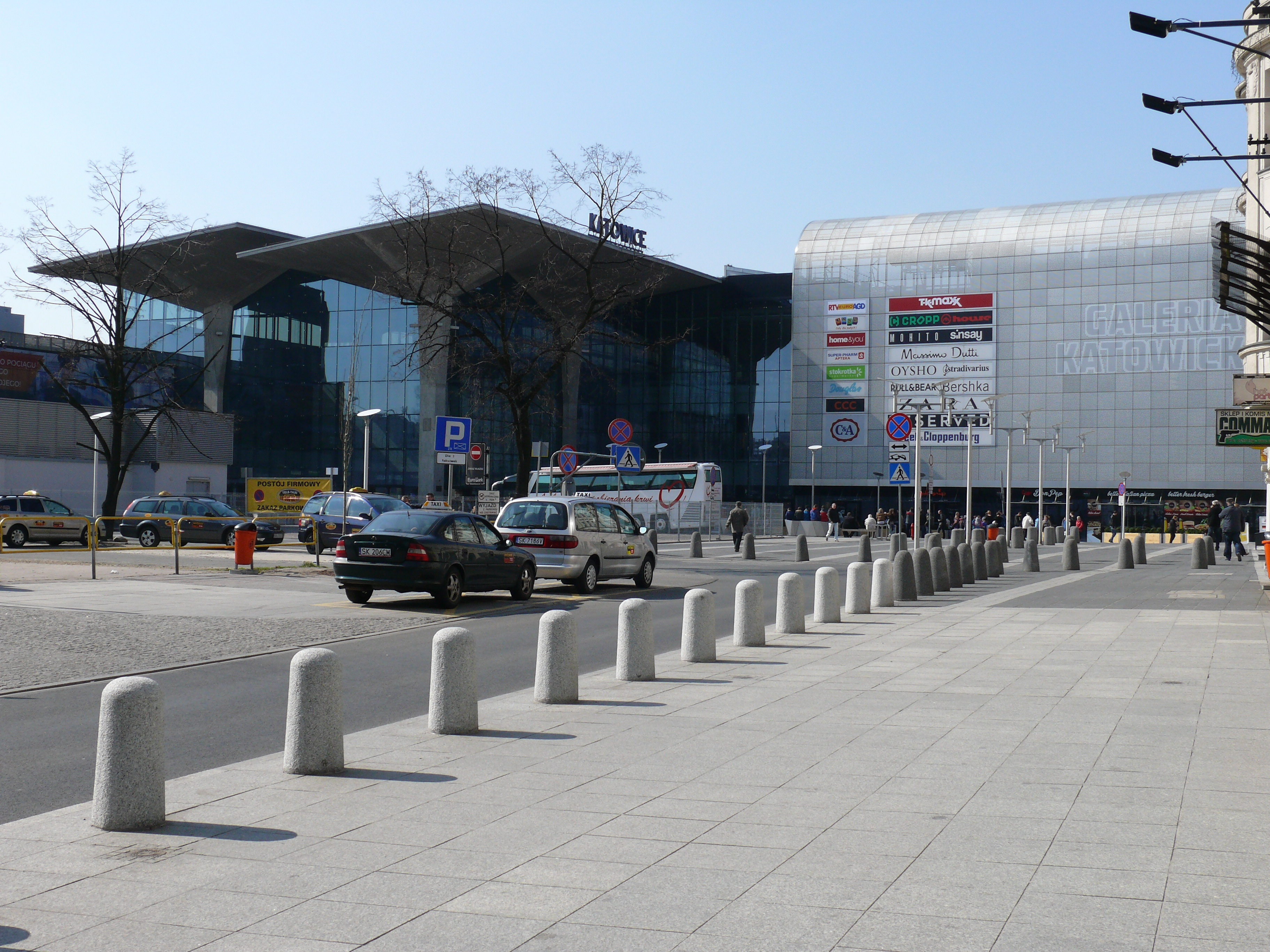 Das Zugangsgebäude zum Hauptbahnhof von Kattowitz. Rechts daneben schließt direkt die Galeria Katowicka an, ein Einkaufszentrum.